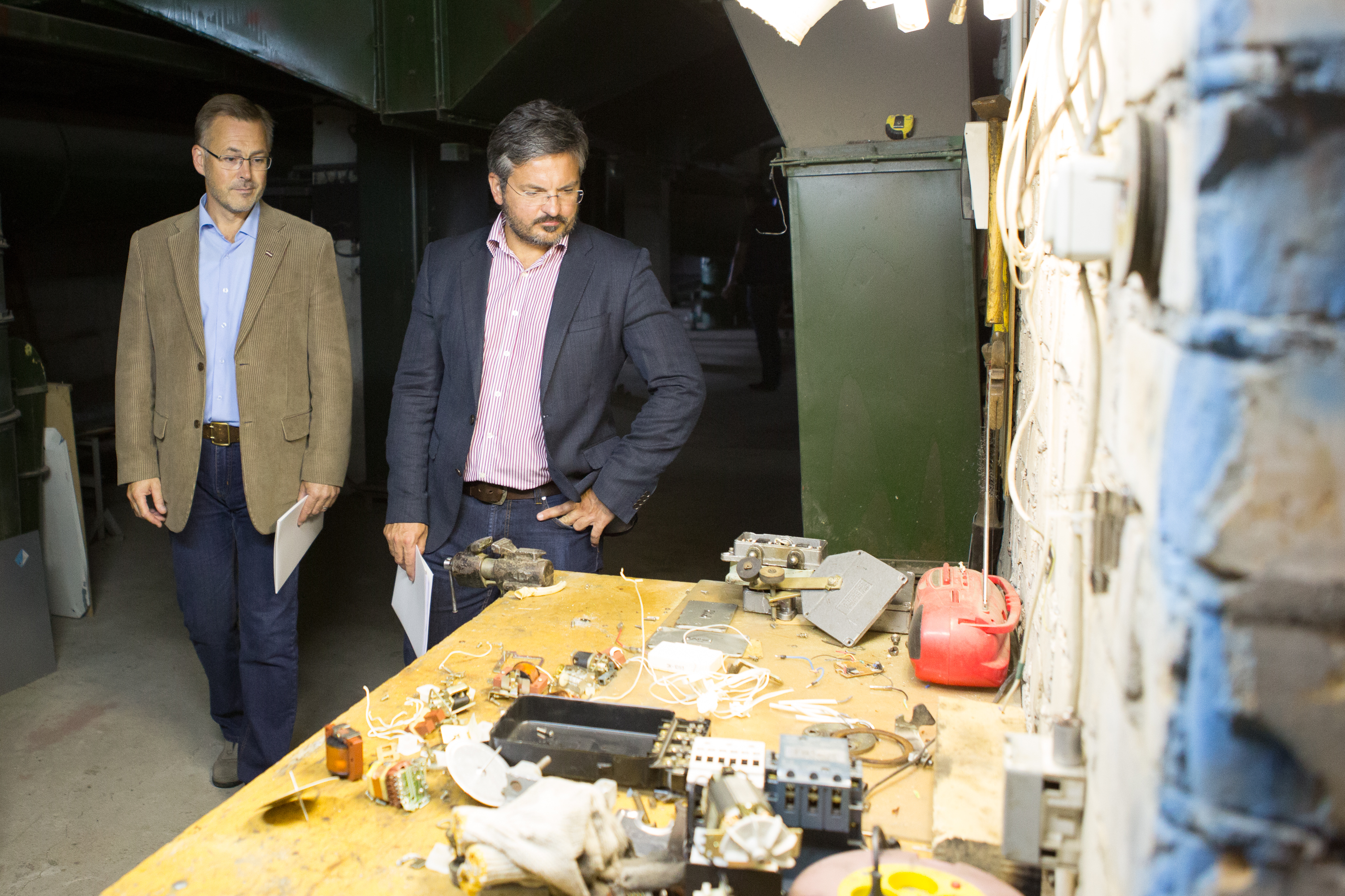 Attēls ir no Zolitūdes traģēdijas parlamentārās izmeklēšanas komisijas 07.09.2015. izbraukuma sēdes Rīgas Austrumu klīniskās universitātes slimnīcas stacionāru "Gaiļezers". Attēlā no kreisās komisijas loceklis A. Loskutovs, komisijas sekretārs I. Dālderis. Informācija par autortiesībām Foto iegūts